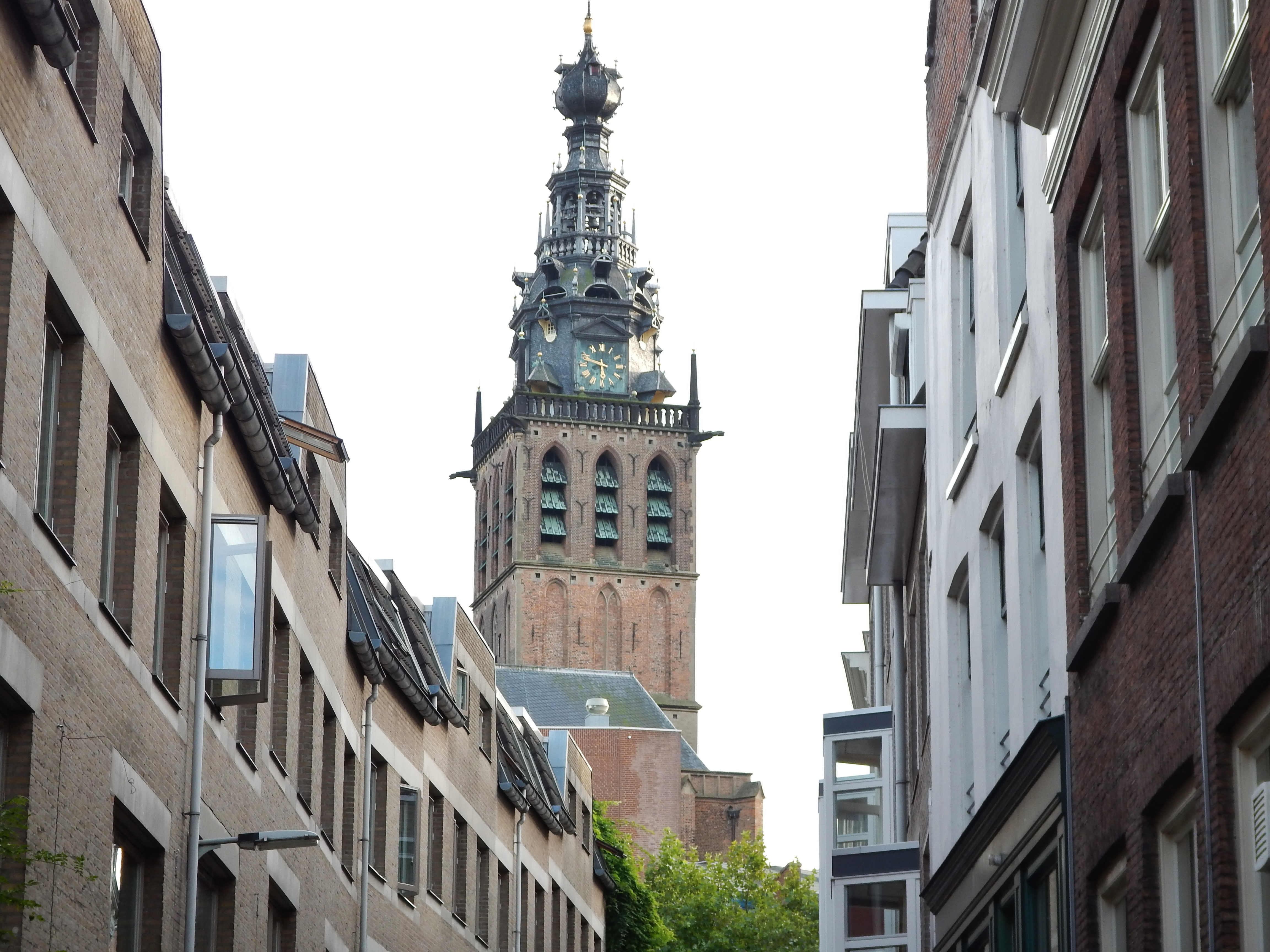 Stevenskirche in Nijmegen